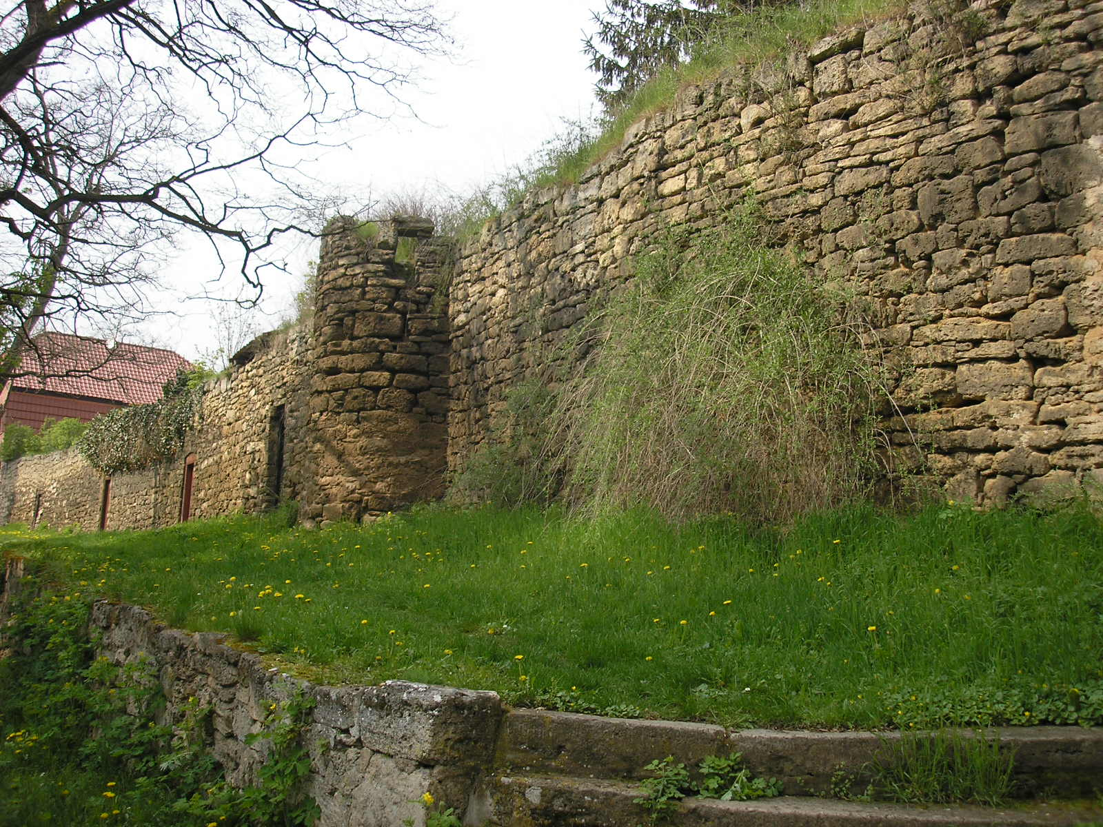 Die Stadtmauer von Greußen (Thüringen). Sie besteht aus zwei Mauern: der unteren und der oberen.